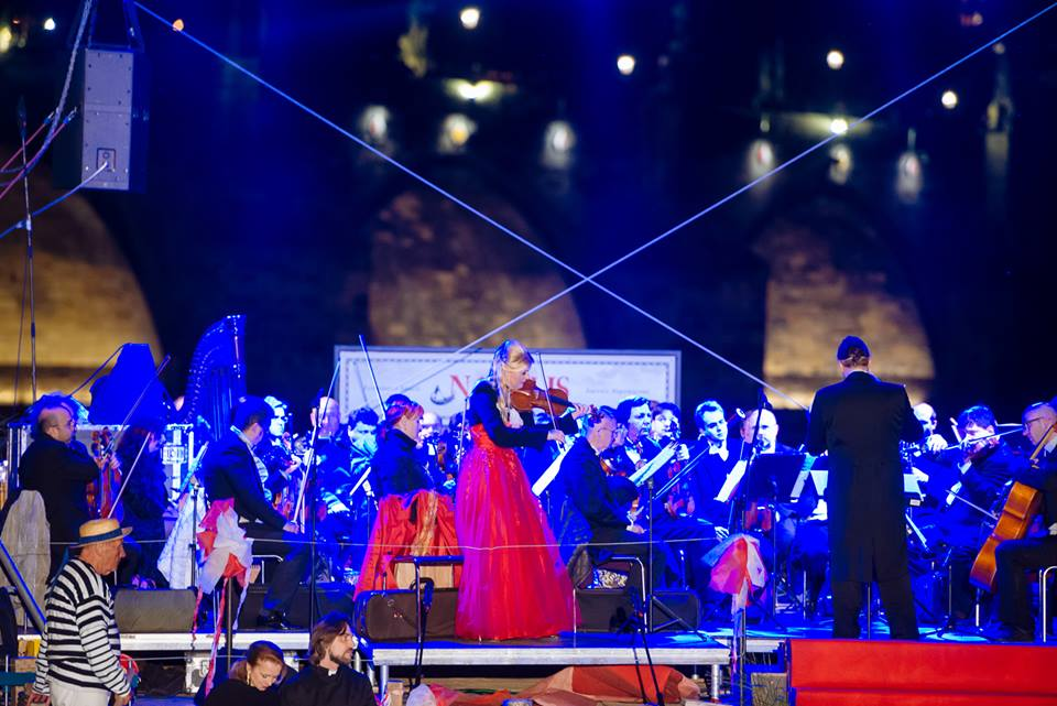 Gabriela Demeterová na Navalis 2015